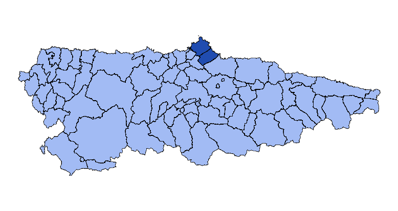 Concejos que forman la mancomunidad asturiana de Cabo de Peñas